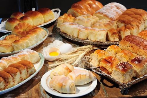 Exemplo do que é considerado "quitanda" em Minas Gerais